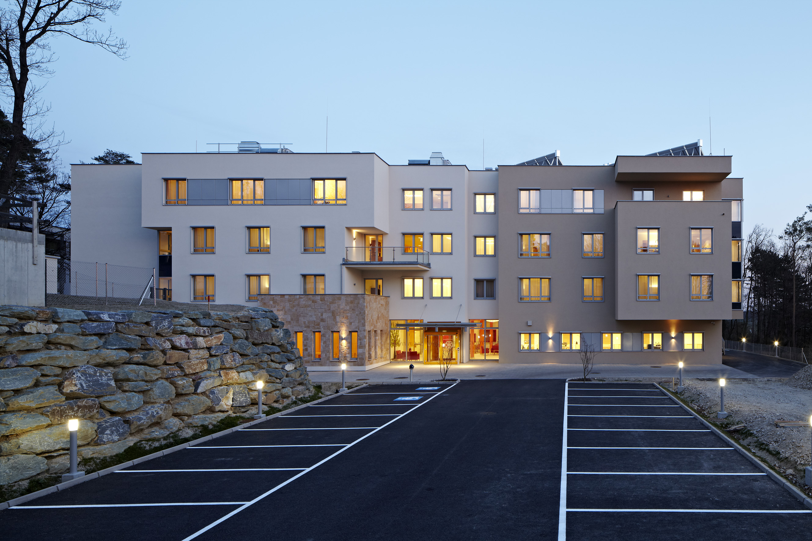 Aussenansicht des Pflegeheims Oberpullendorf (Burgenland)